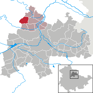 Frömmstedt in Thuringia - District Sömmerda